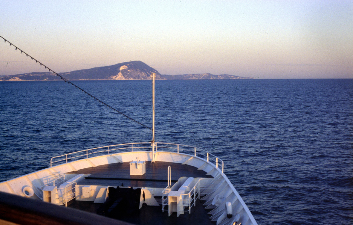 F/B Ariadne (Bj. 1967, Minoan Lines: 1976-1999)